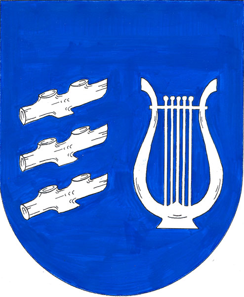 Znak obce Podmokly (okres Klatovy)